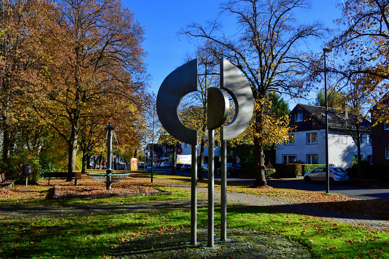 Oberforstbach, Aachen Kornelimünster/Walheim